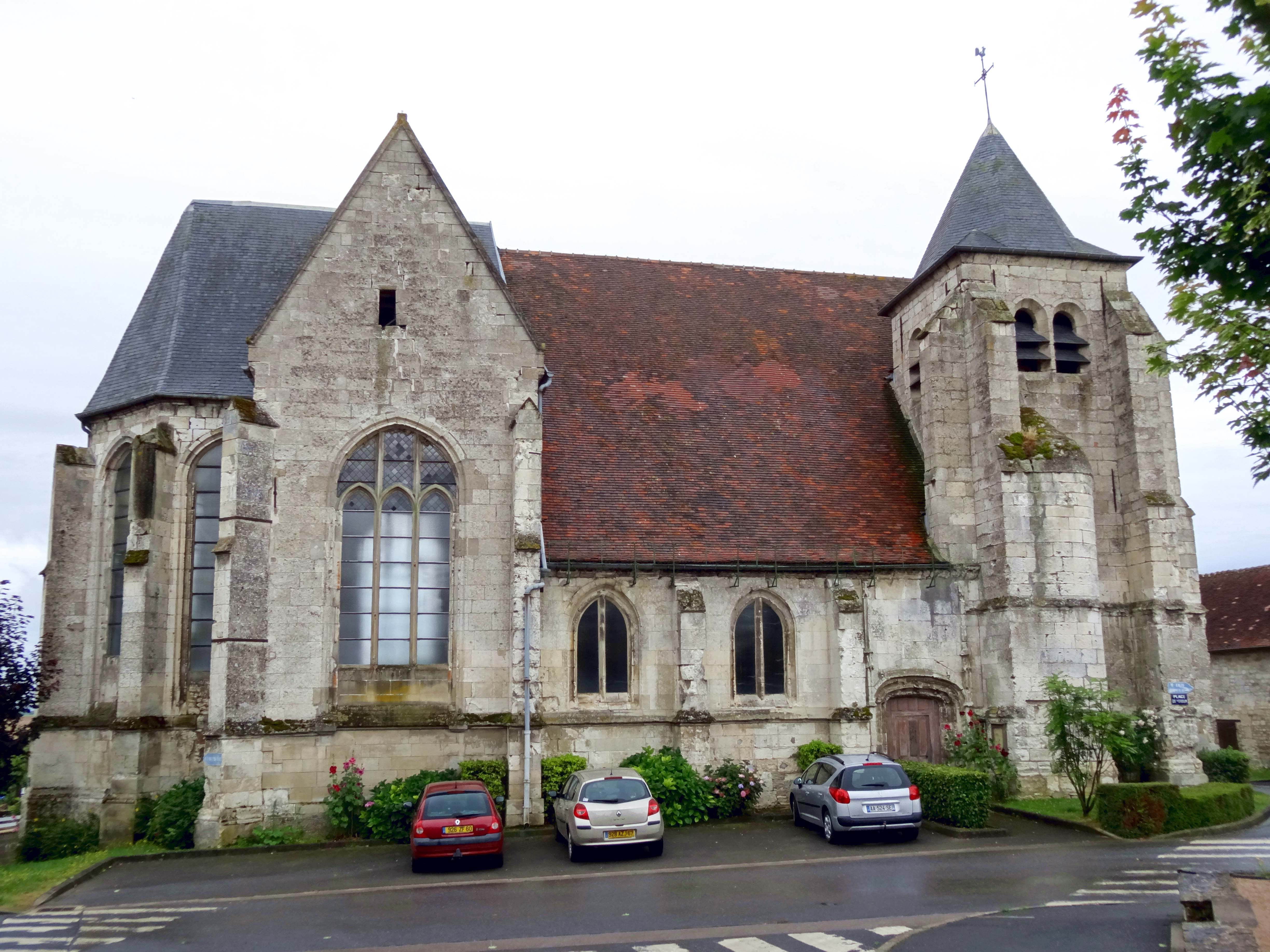 Église Saint-Martin de Maimbeville - voir titre.